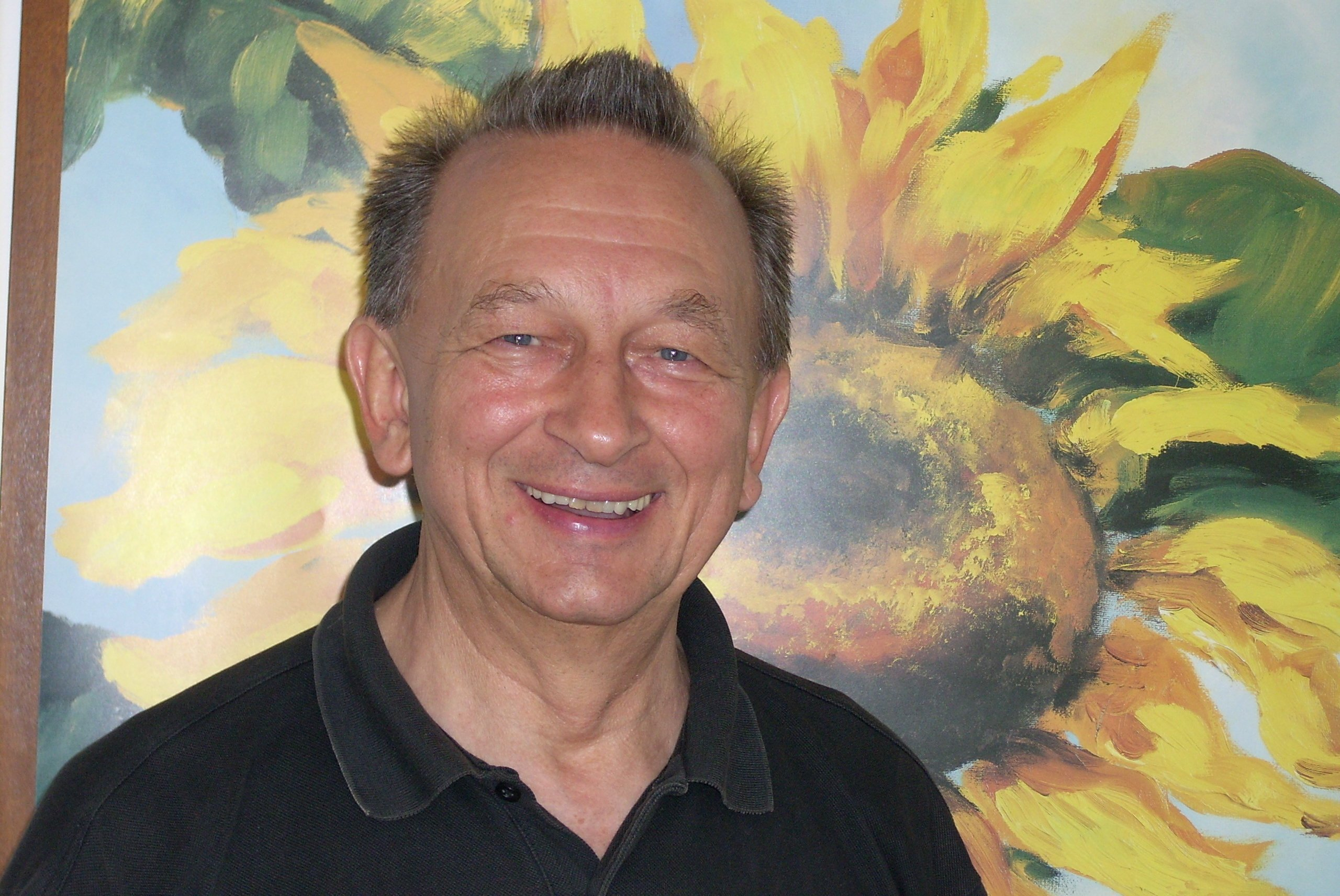 Dr. Eugen Macko, deutscher Esperantistist